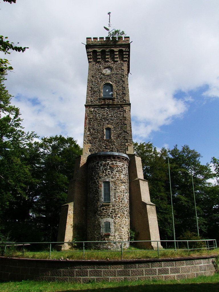 Turm der Wilhelm-Raabe-Warte